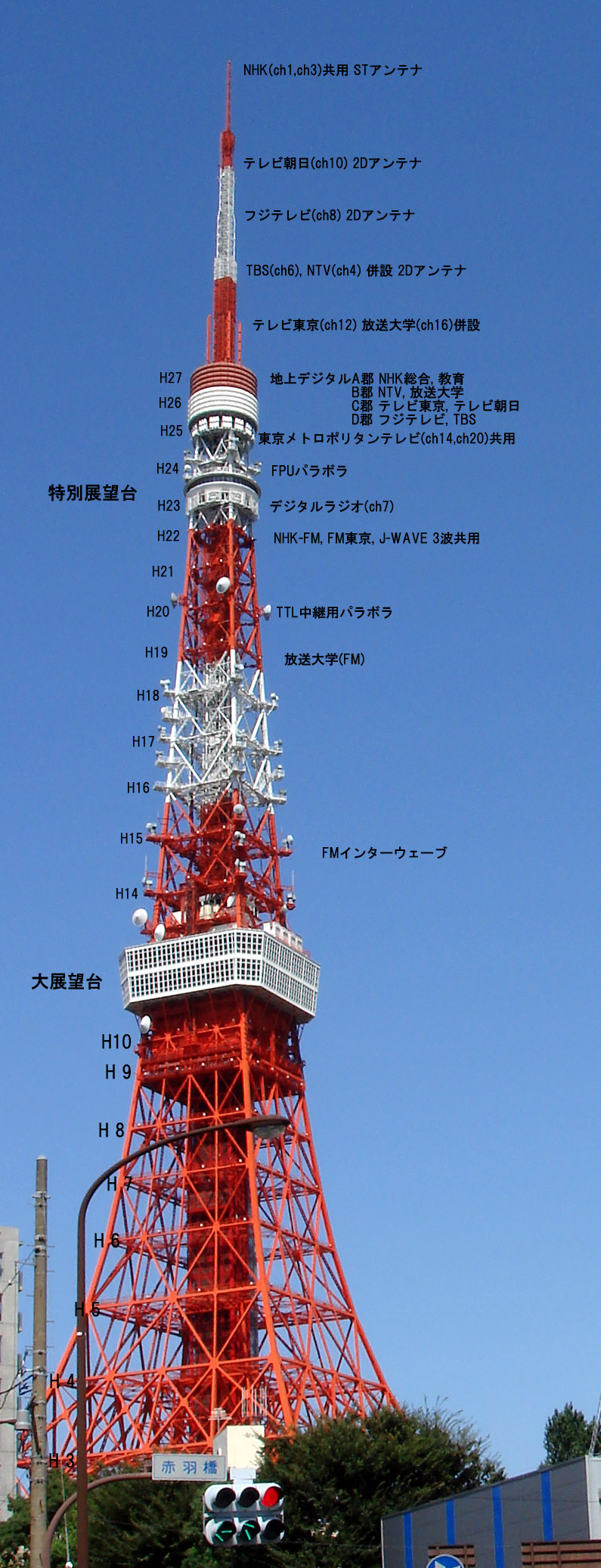 東京タワーのアンテナの配置